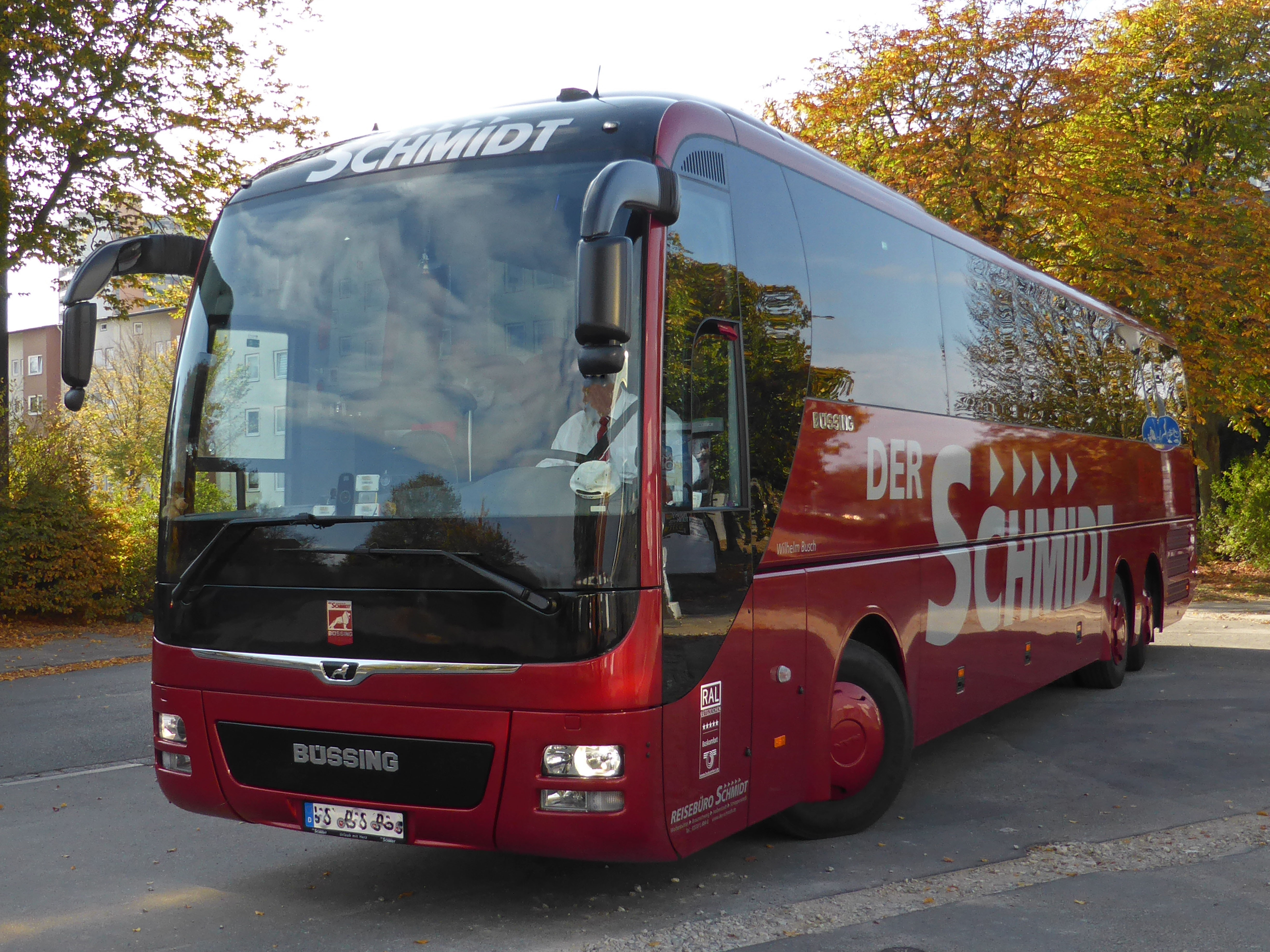 Reisebus MAN Lion's Coach, Baujahr 2017 oder 2018. Vermutlich aus nostalgischen Gründen hat der Eigentümer einen Büssing-Schriftzug statt des MAN-Schriftzugs an der Front dieses besonders hochwertig ausgestatteten Busses anbringen lassen (vgl. [1]. Der Fahrzeughersteller Büssing ist nicht mehr im Geschäft, dieses Fahrzeug ist nicht tatsächlich von Büssing hergestellt.